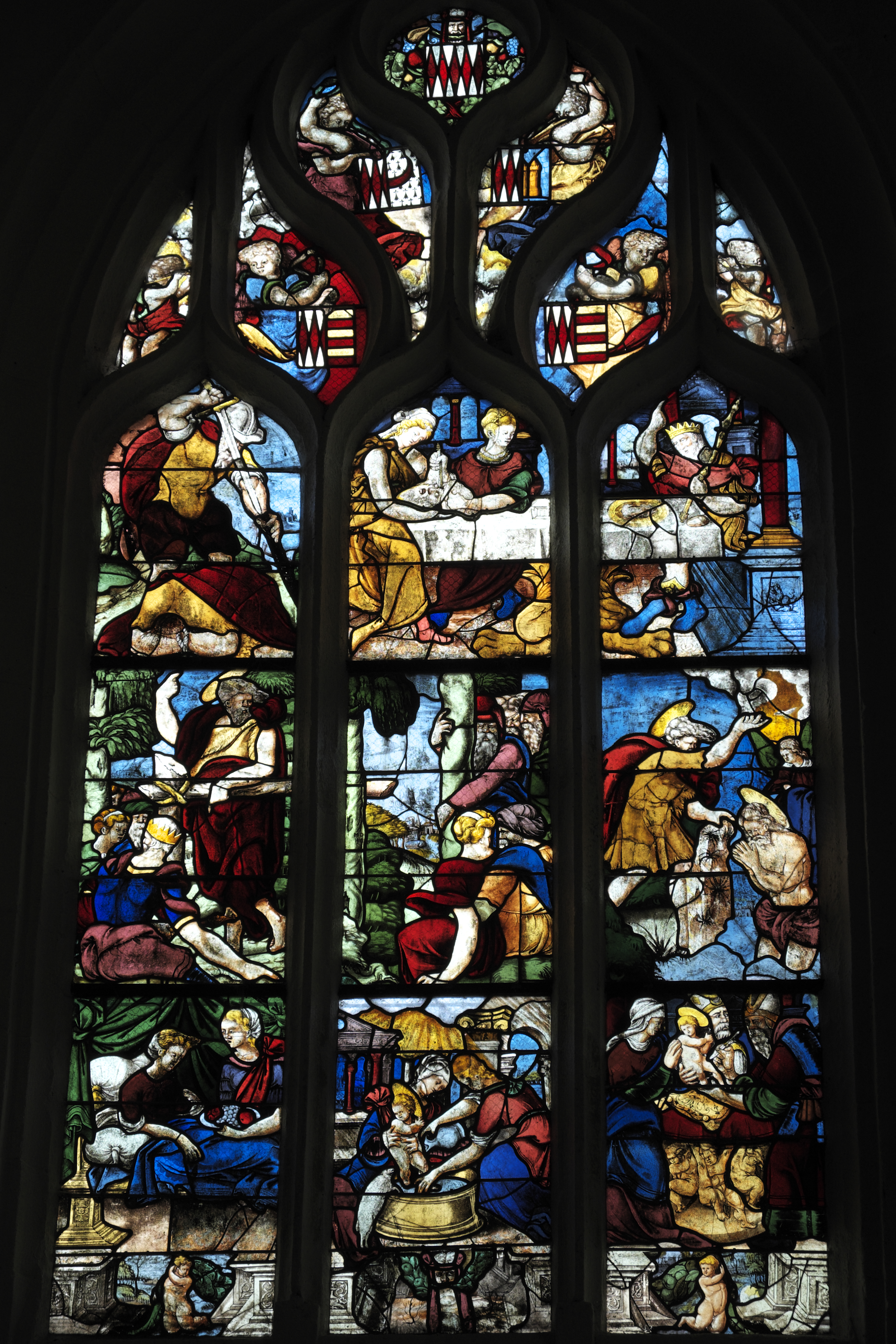 Kapelle Saint-Fiacre in Le Faouët im Département Morbihan (Region Bretagne/Frankreich), Bleiglasfenster Leben Johannes des Täufers aus der Mitte des 16. Jahrhunderts, 1912 von Marcel Delon in Paris restauriert